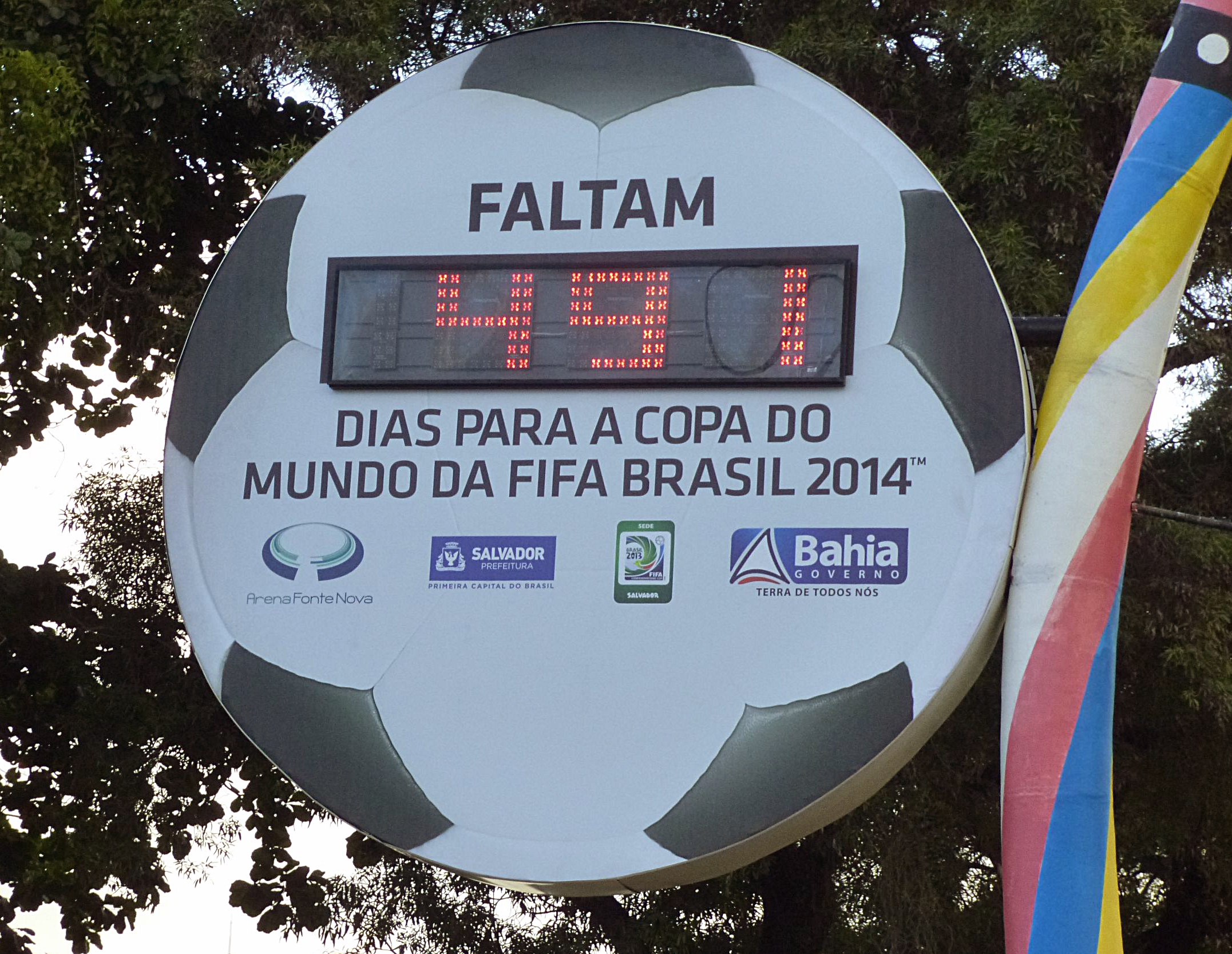 Alexius_Countdown_Fußballweltmeisterschaft_Salvador_Bahia_2013